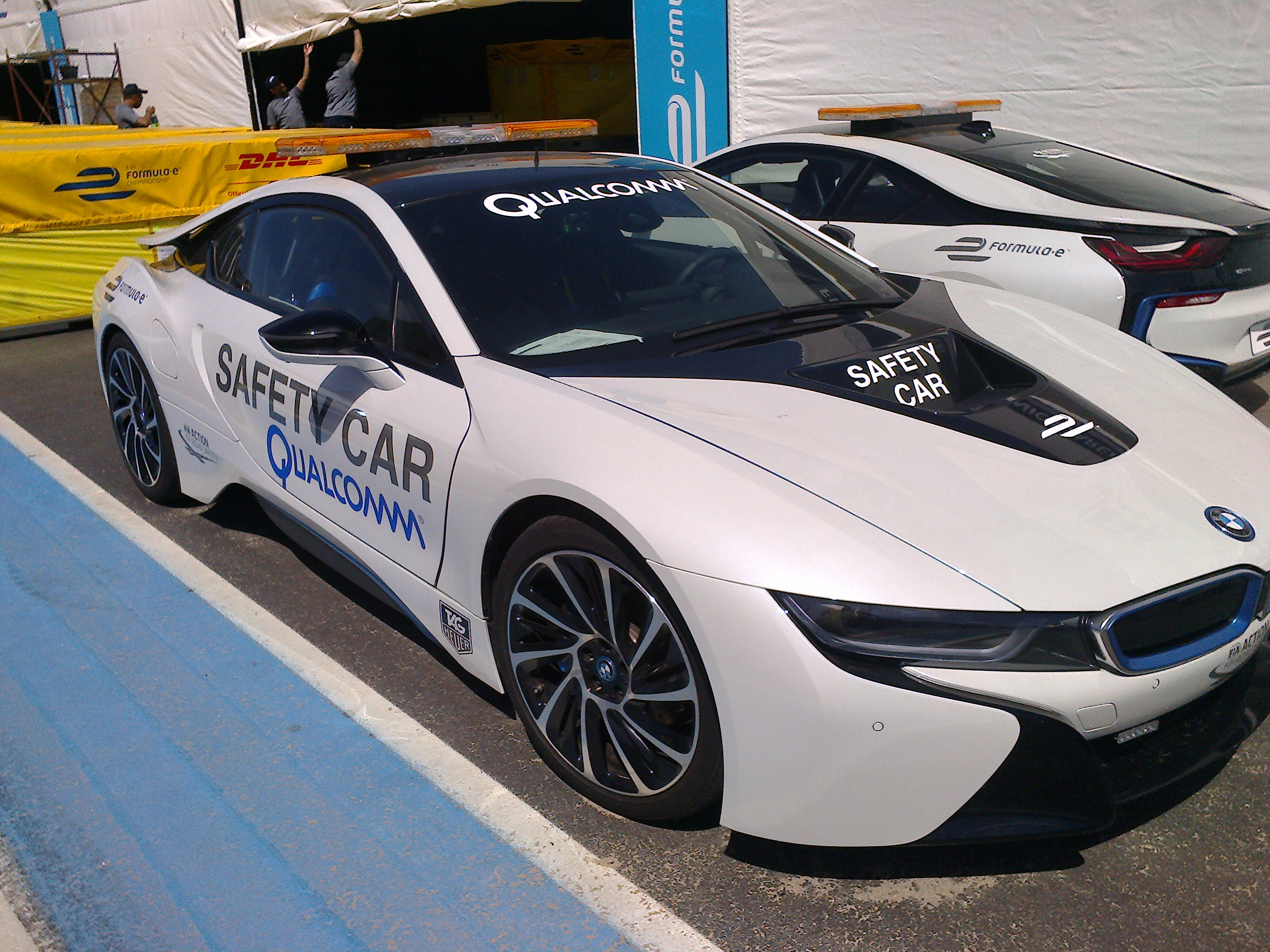 aaaaa